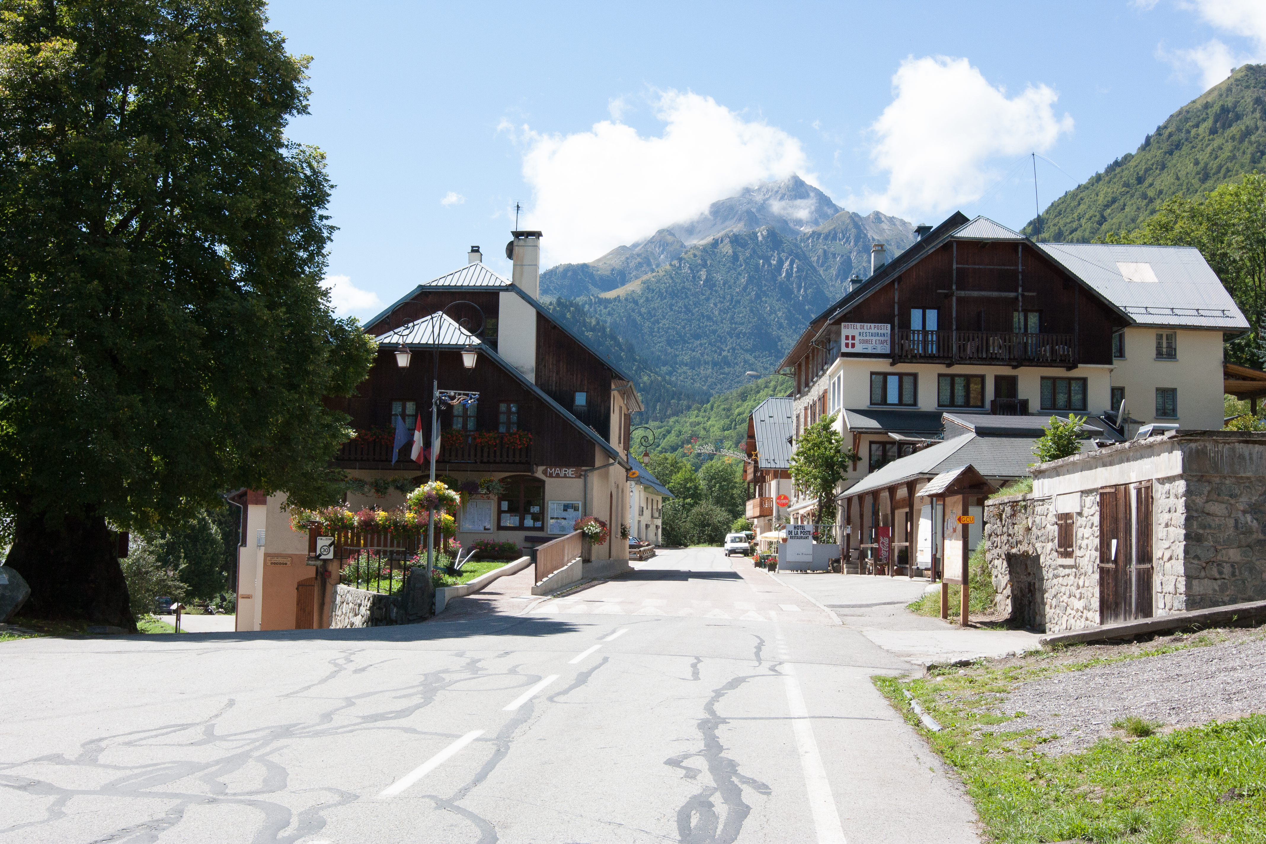 Vue de Saint-Colomban-des-Villards / Saint-Colomban-des-Villards / Savoie / France